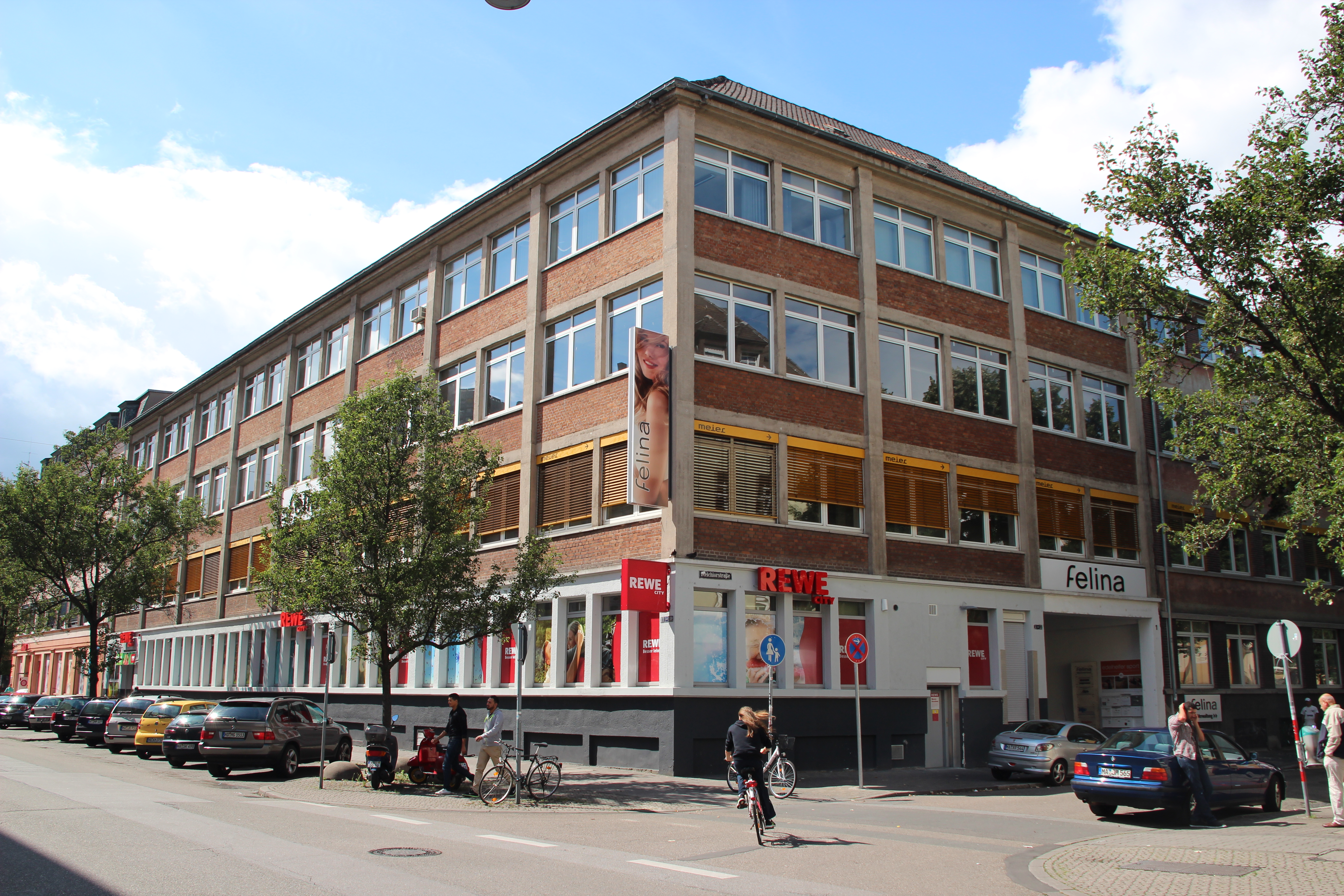 Bildinhalt: Gebäude der Firma Felina in der Lange Rötterstraße Aufnahmeort: Mannheim, Deutschland